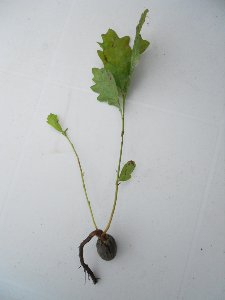 Photographie d'un gland germé extrait du sol (Quercus robur).